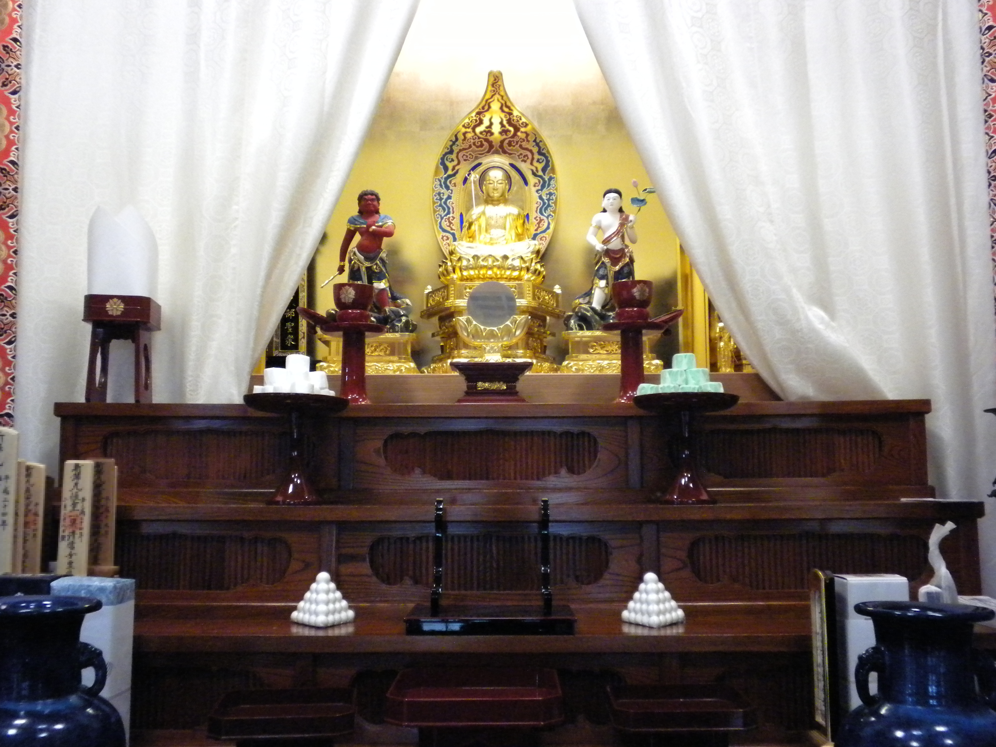 先照寺の延命地蔵菩薩